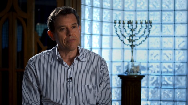 Nilton Bonder (Porto Alegre, 27 de dezembro de 1957) é um rabino brasileiro e Rosh da Congregação Judaica do Brasil, no Rio de Janeiro.